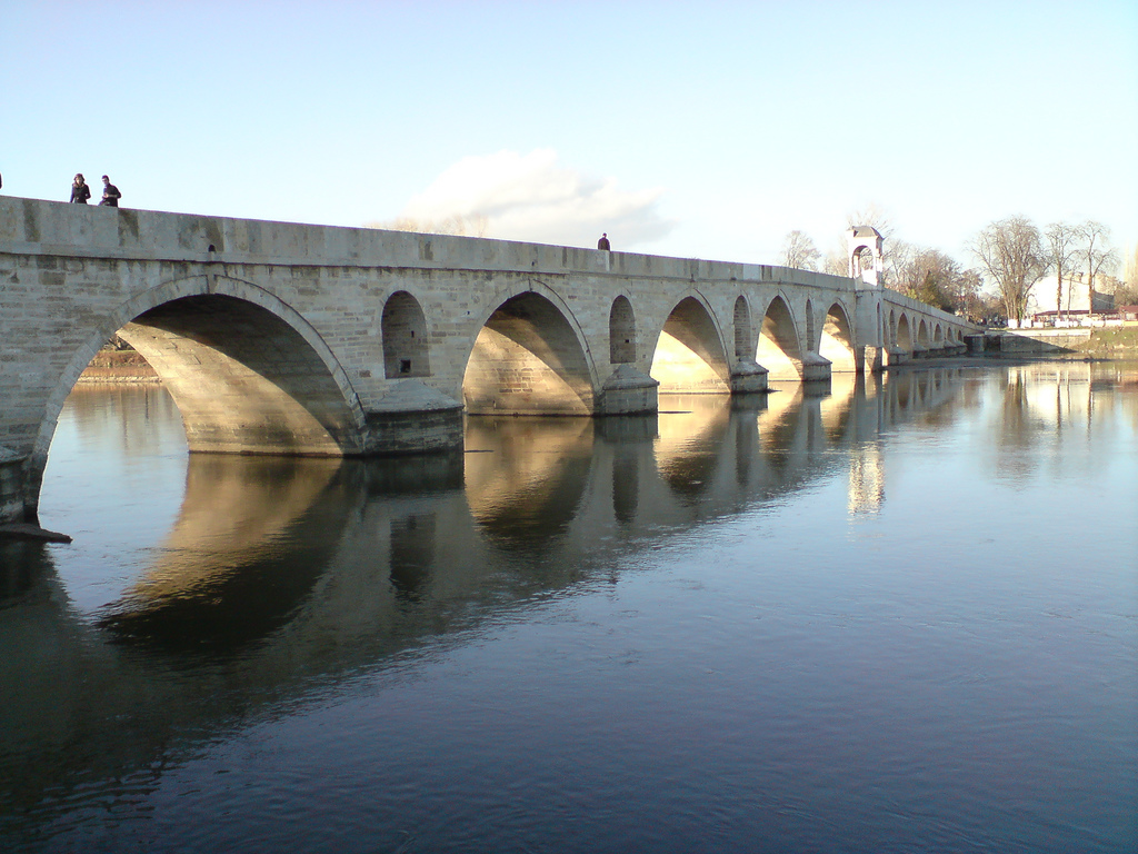 Aralık Ayında Meriç Köprüsü ve Meriç Nehri, Öğleden Sonra